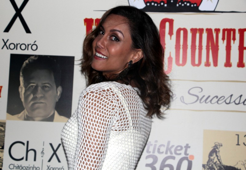 Ex-bbb Lya K